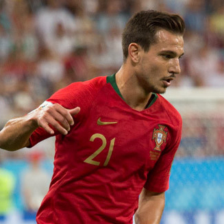 Гол на 93-й минуте и незабитый пенальти Роналду. Иран попортил нервы португальцам